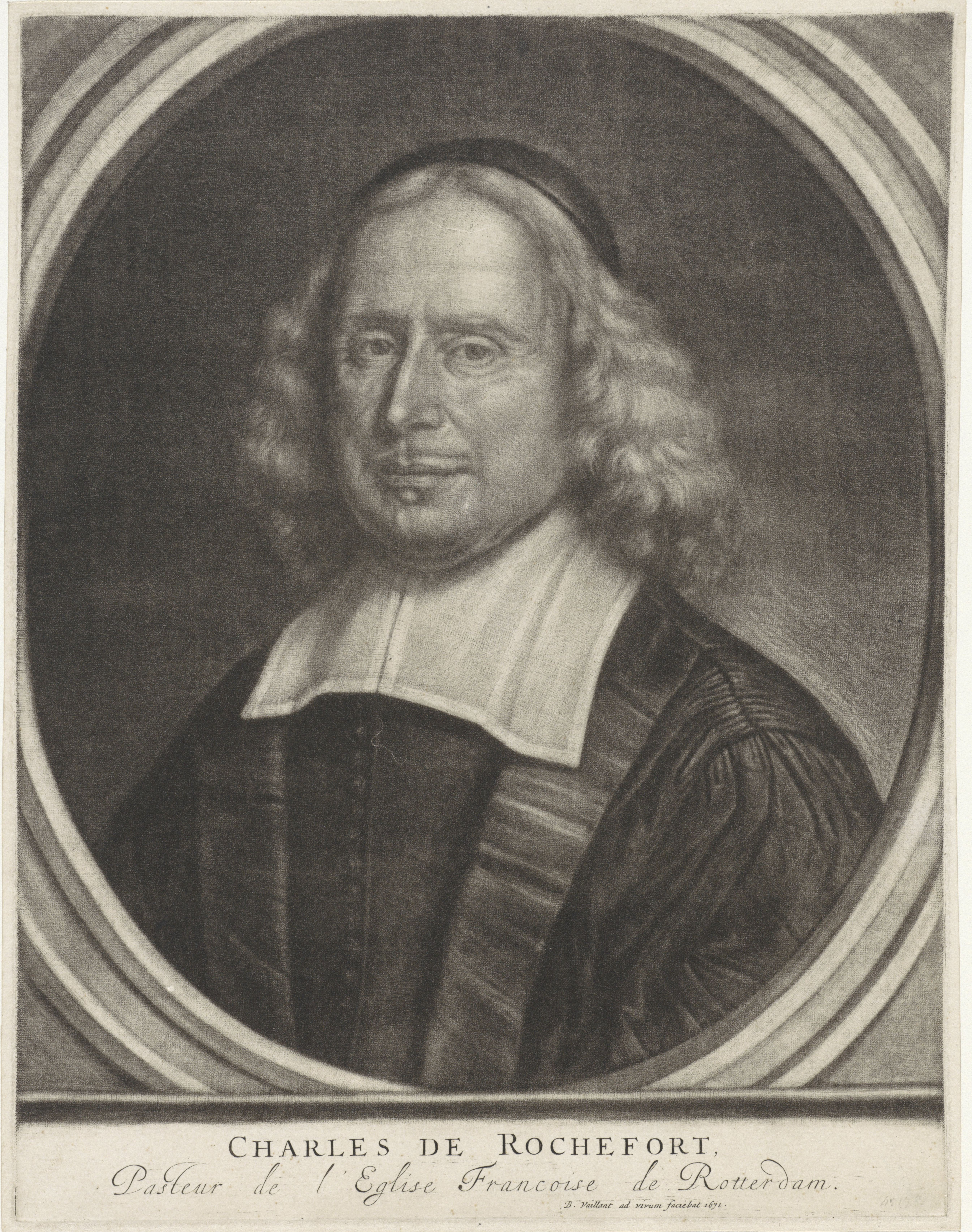 IdentificatieTitel(s): Portret van de predikant Charles de RochefortObjecttype: prent Objectnummer: RP-P-1910-1520Catalogusreferentie: Hollstein Dutch 22-2(2)Opschriften / Merken: verzamelaarsmerk, verso, gestempeld: Lugt 2228VervaardigingVervaardiger: prentmaker: Bernard Vaillant (vermeld op object)Plaats vervaardiging: AmsterdamDatering: 1671Fysieke kenmerken: mezzotint en gravureMateriaal: papier Techniek: mezzotint / graveren (drukprocedé)Afmetingen: plaatrand: h 277 mm × b 214 mmOnderwerpWie: Charles de RochefortVerwerving en rechtenVerwerving: aankoop 1910Copyright: Publiek domein